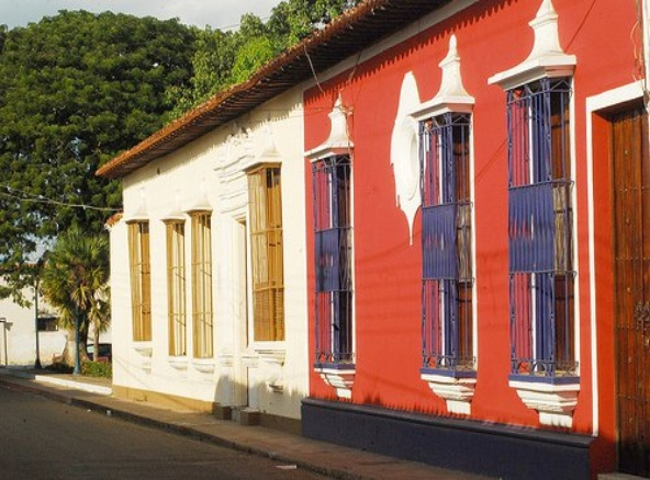 Casas típicas en Calabozo